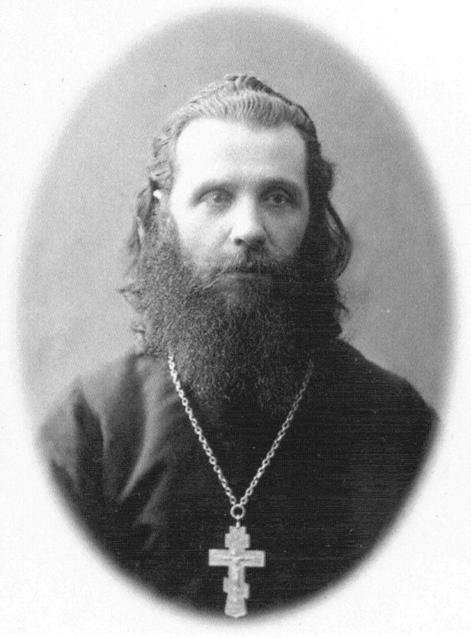 священник Иоанн Вереиенников